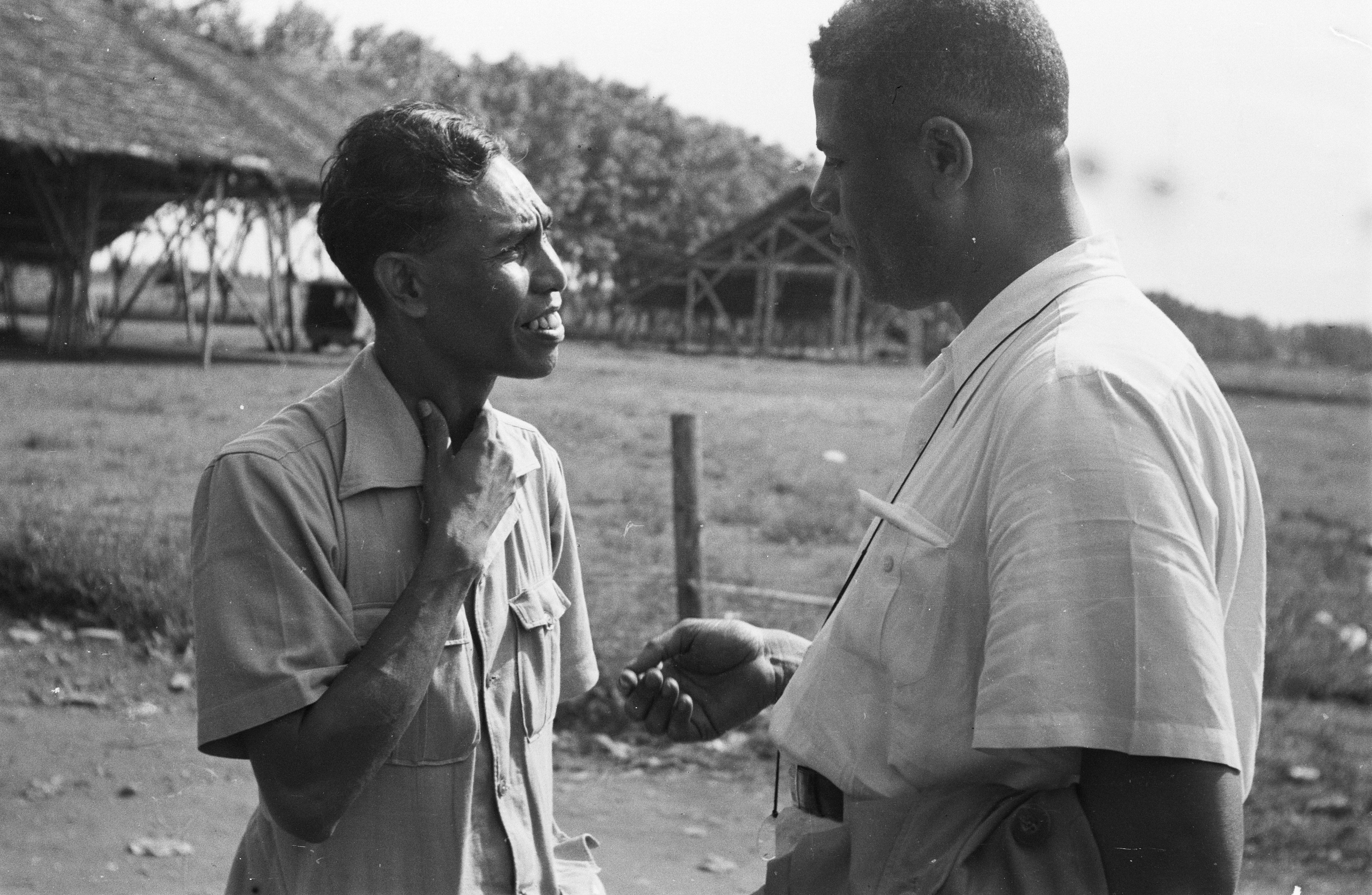 Collectie / Archief : Fotocollectie Dienst voor Legercontacten Indonesië Reportage / Serie : [DLC] Bezoek kolonel Julian aan Indonesië Beschrijving : Vliegveld Djokjakarta. Kolonel Julian heeft een gesprek met dr. Leimena, voormalig minister van Volksgezondheid van de Republiek. Annotatie : De zwarte Amerikaans kolonel b.d. Hubert F. Julian, een voormalige piloot met de bijnaam "Black Eagle" bezocht als journalist Indonesië. Hij was fel anti-communistisch en steunde de Nederlandse houding in het conflict. Datum : januari 1949 Locatie : Indonesië, Nederlands-Indië Fotograaf : Fotograaf Onbekend / DLC Auteursrechthebbende : Nationaal Archief Materiaalsoort : Negatief (zwart/wit) Nummer archiefinventaris : bekijk toegang 2.24.04.02 Bestanddeelnummer : 3991